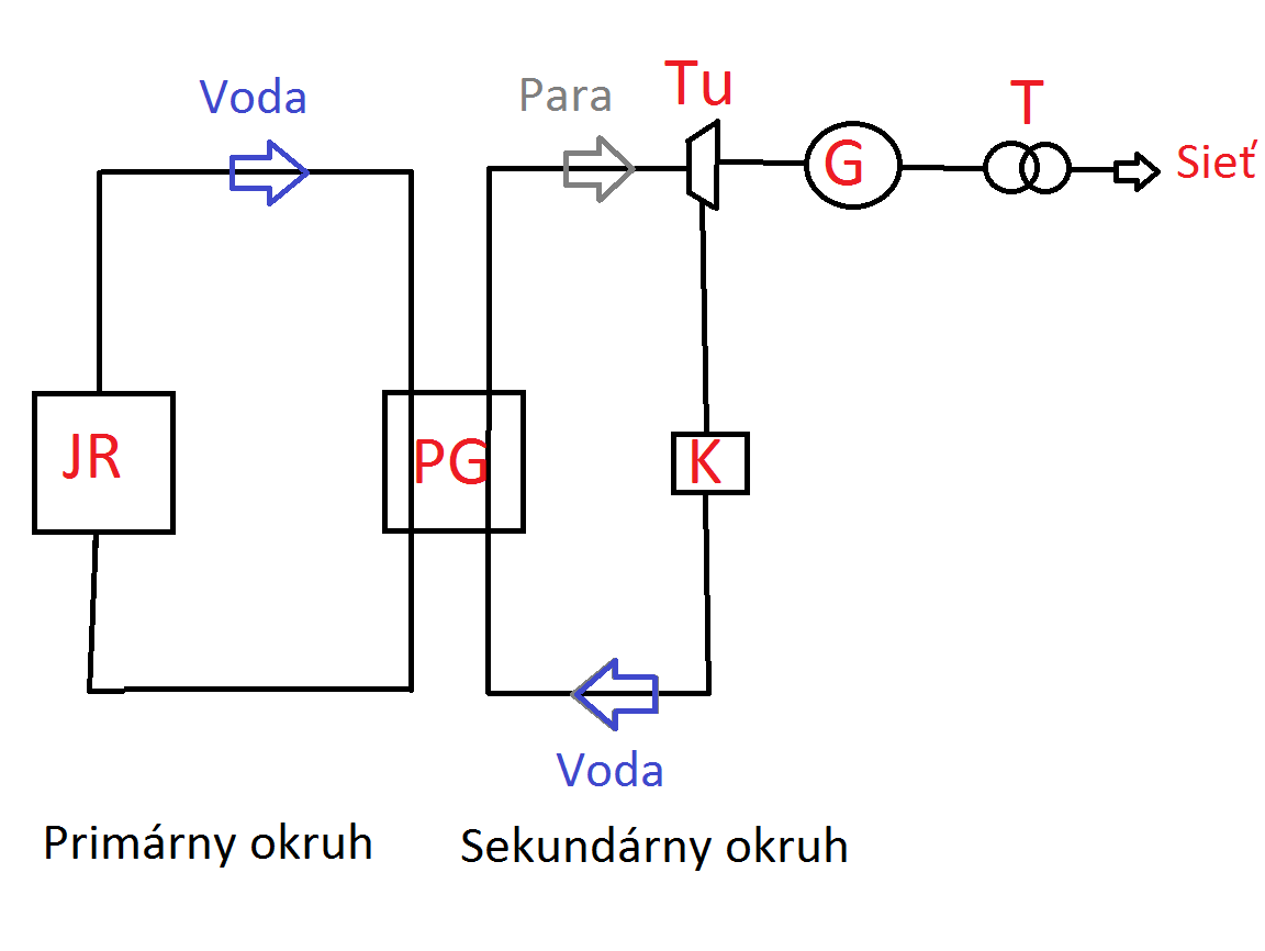 JR - jadrový reaktor PG - parogenerátor Tu - turbína G - generátor T - transformátor K - kondenzátor